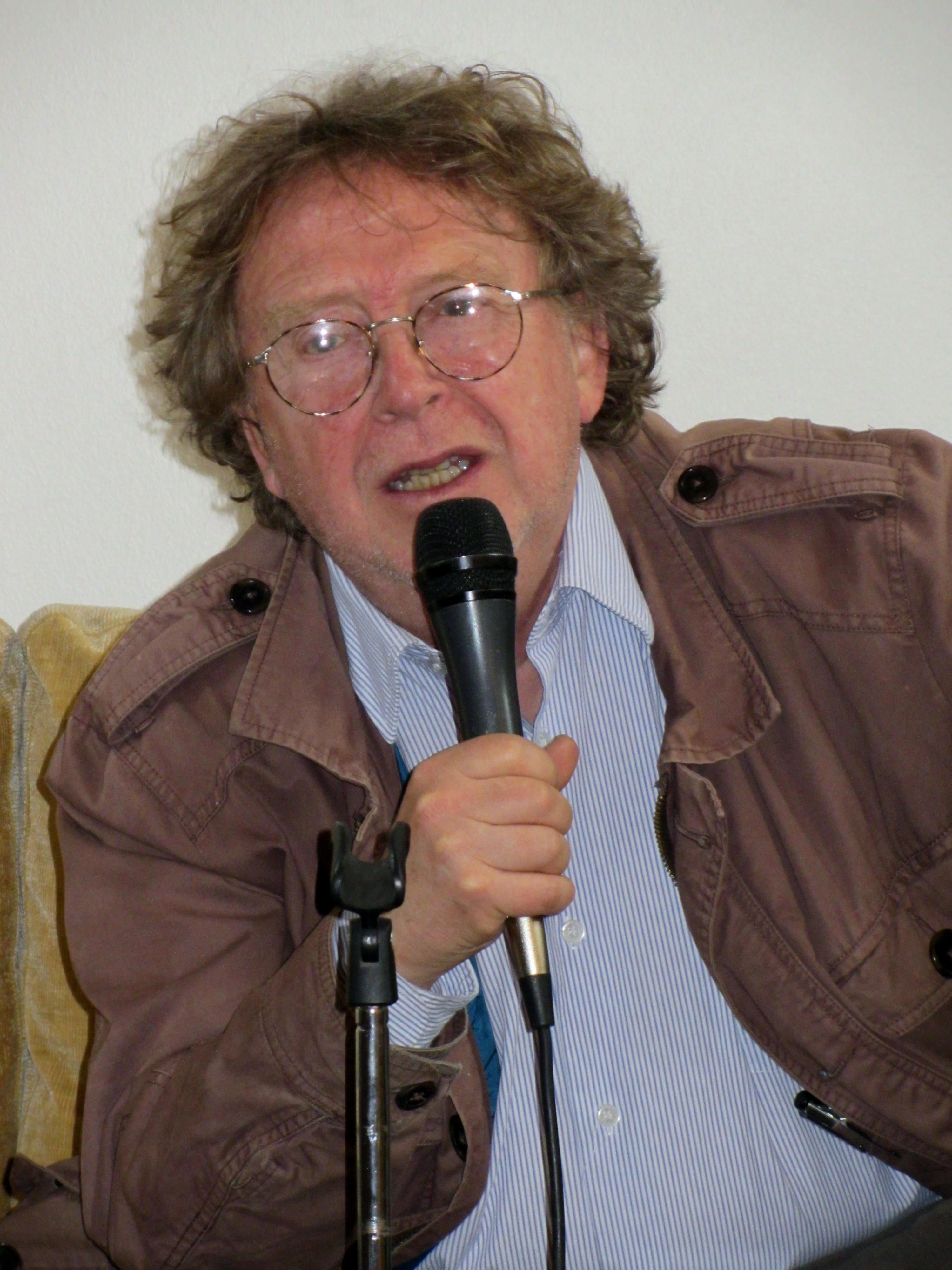 El poeta chileno Juan Cameron en la Feria Internacional del Libro de Santiago 2015